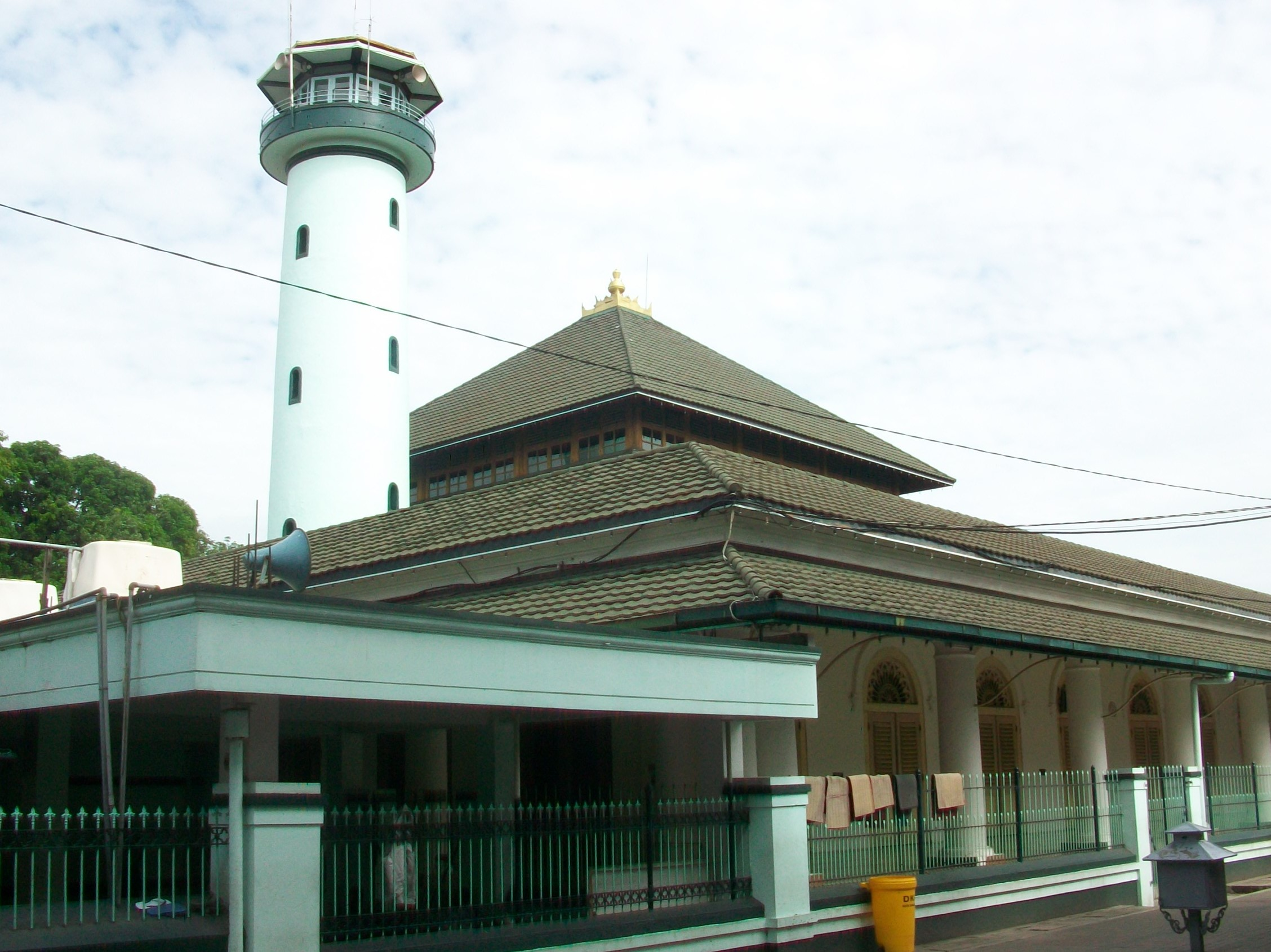 Ampel Mosque in 2008